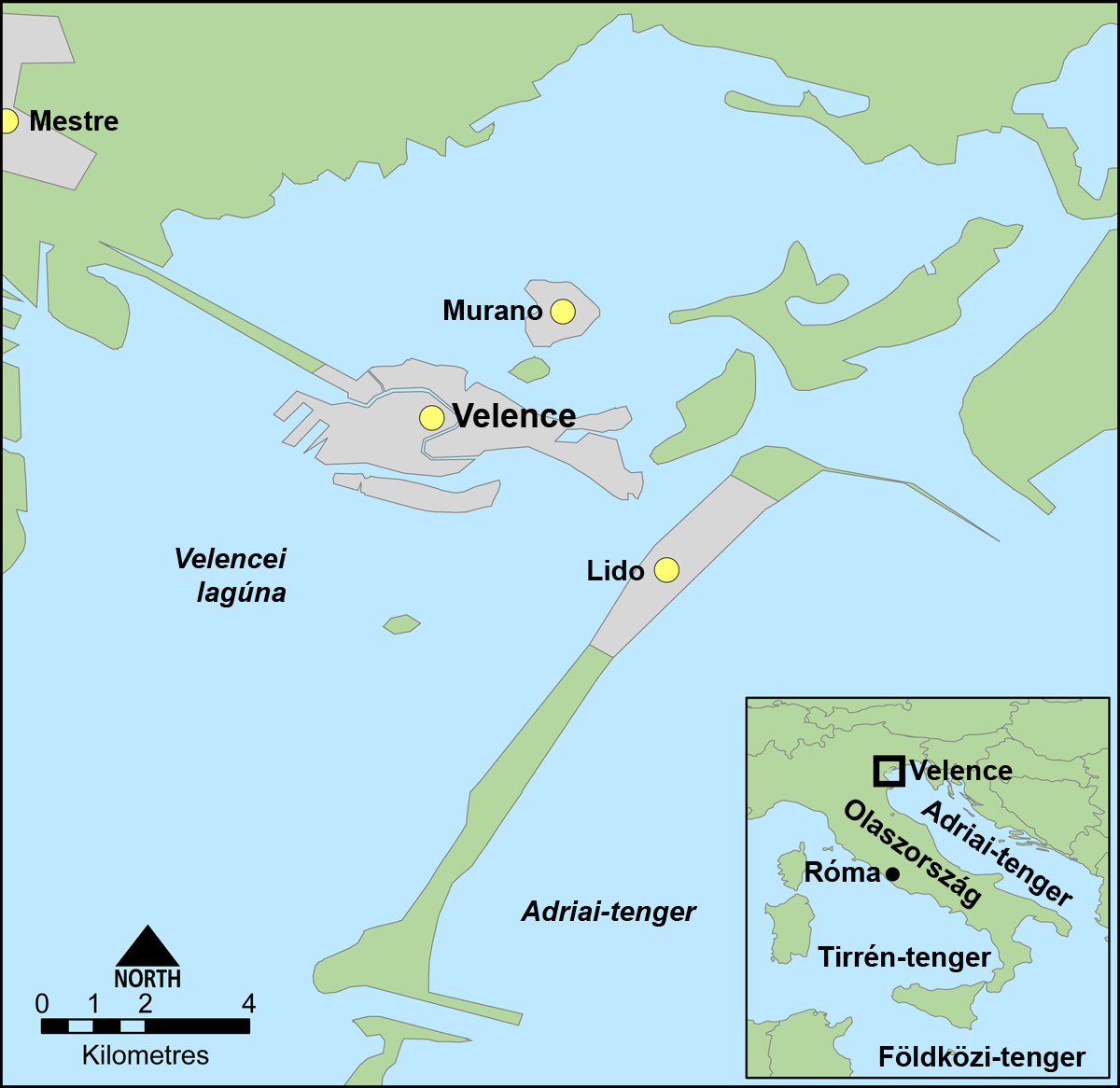 A velenci lagúna térképe